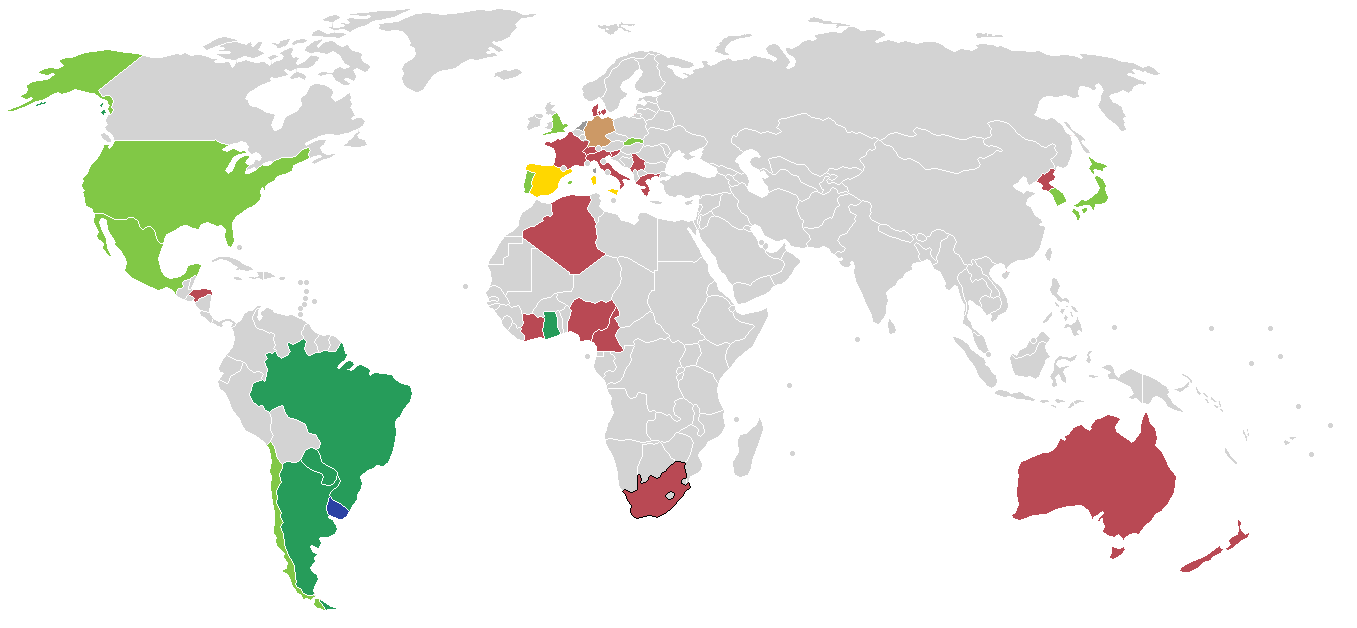 Classement par carte. (Pays de la Coupe du Monde 2010)